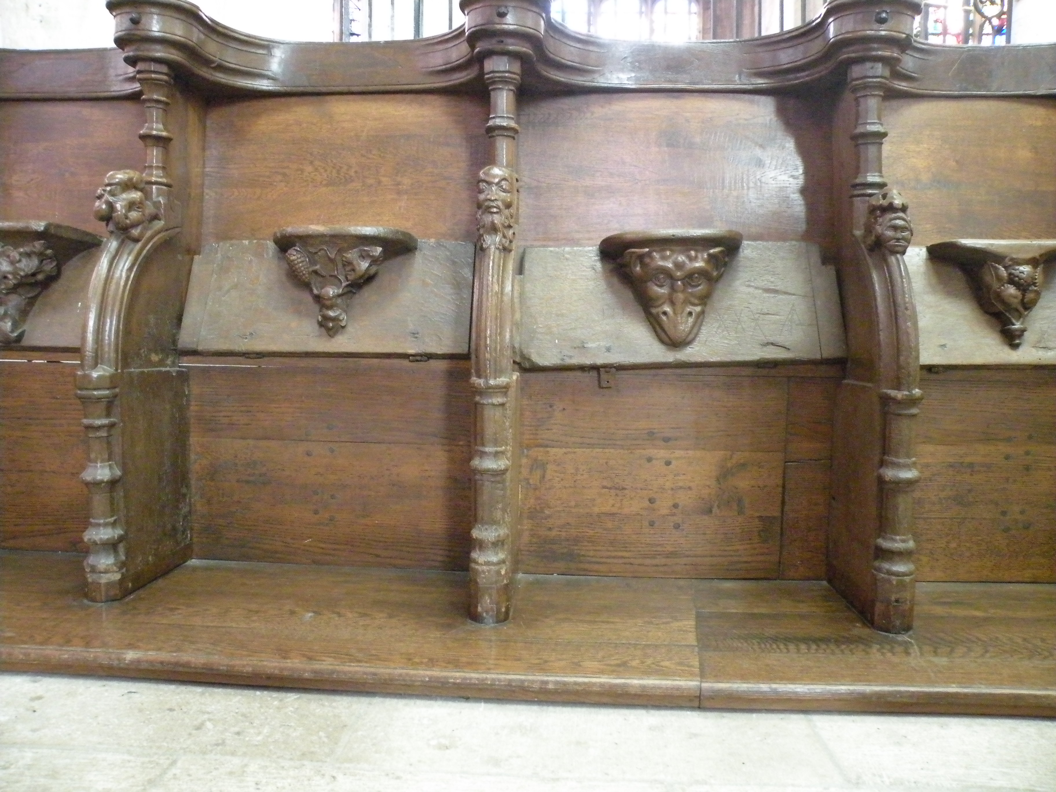 Miséricordes de l'Église Saint-Étienne de Beauvais (60) France